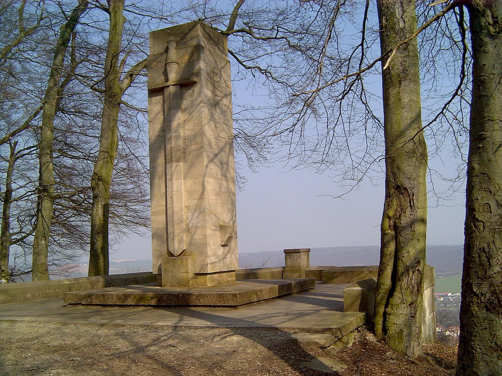 Rondell Sondershausen. Blick zum Ehrenmal Richtung Norden.